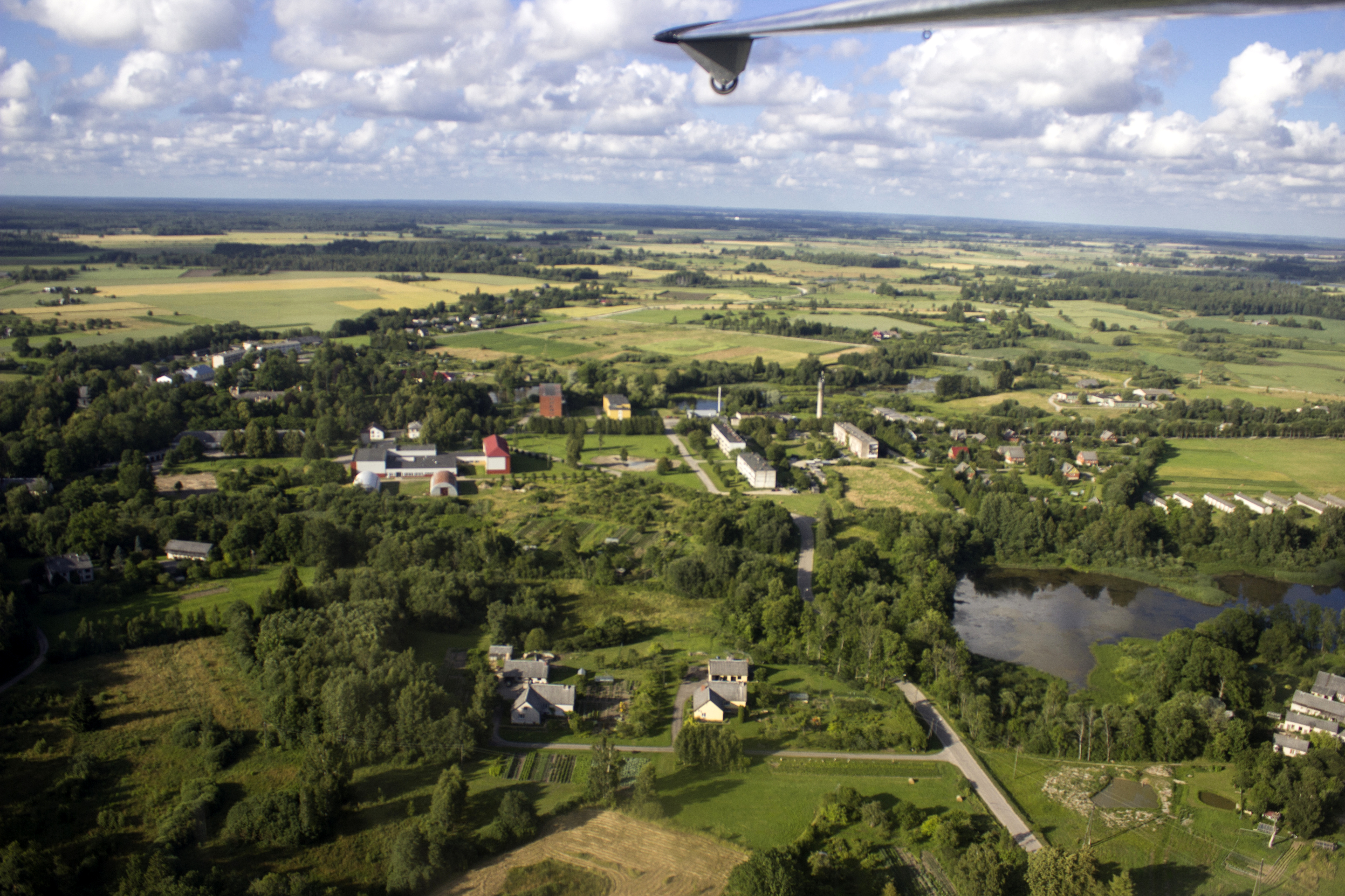 Cīrava